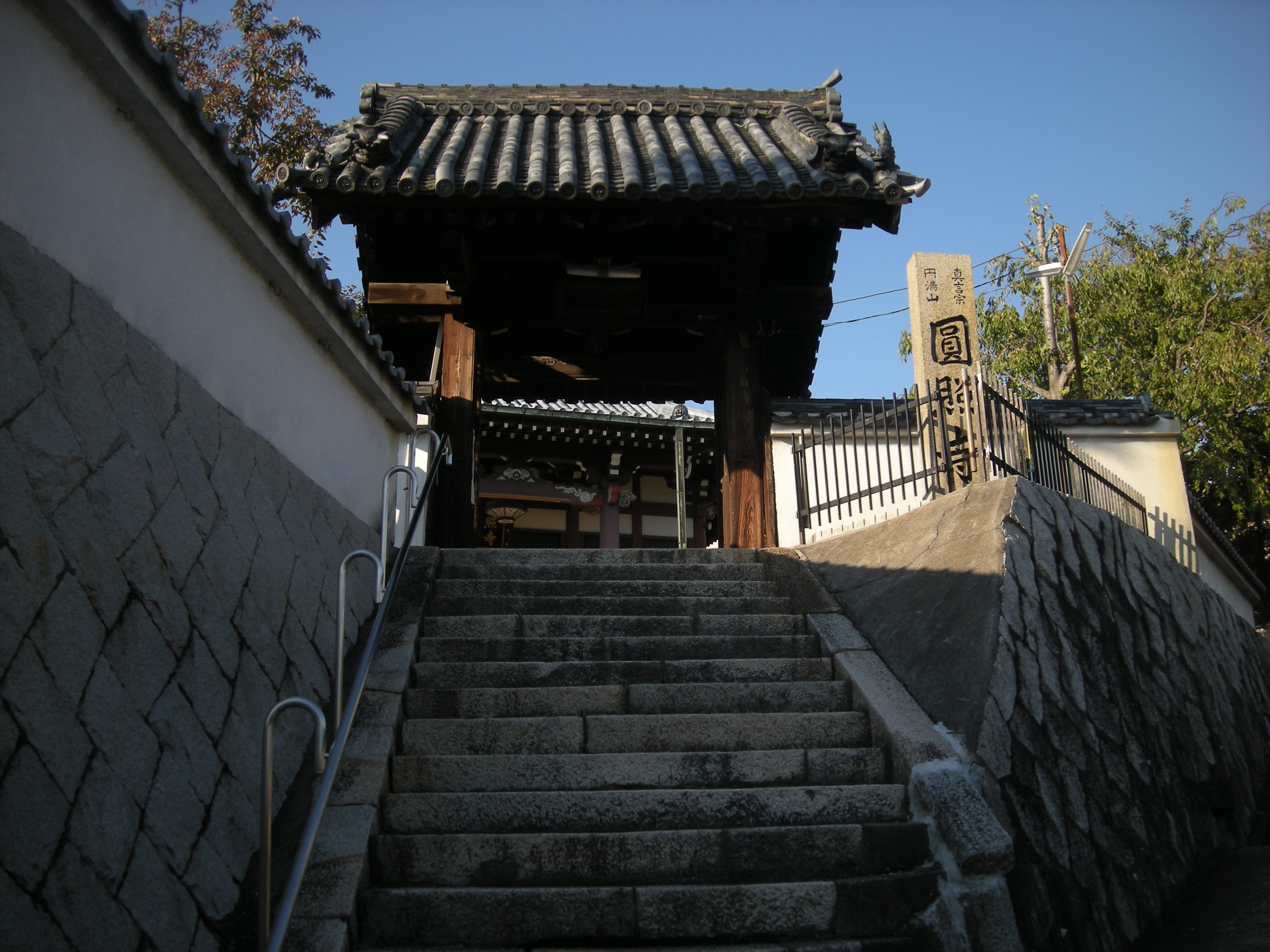 圓照寺 (吹田市)